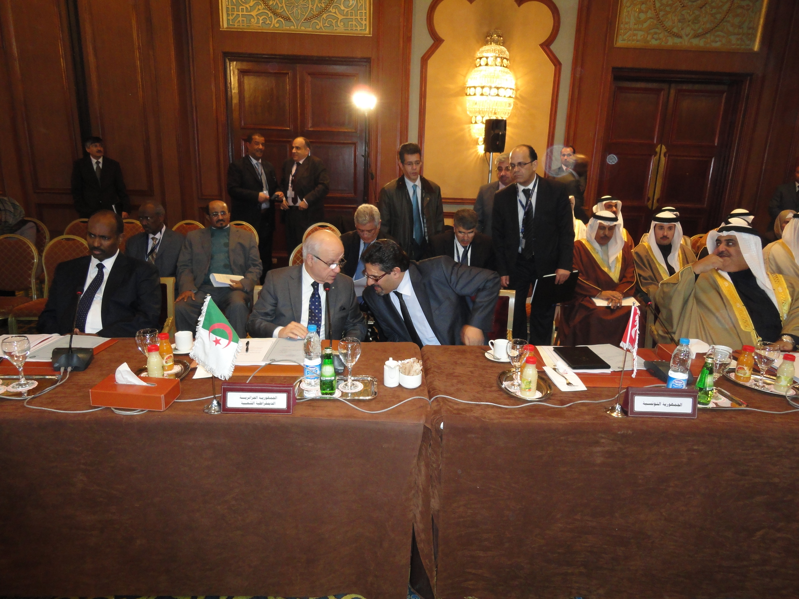 Le Ministre des Affaires Etrangères, Dr Rafik Abdessalem a annoncé, dimanche au Caire, la tenue à Tunis le 24 février courant d'une conférence internationale sur la Syrie.